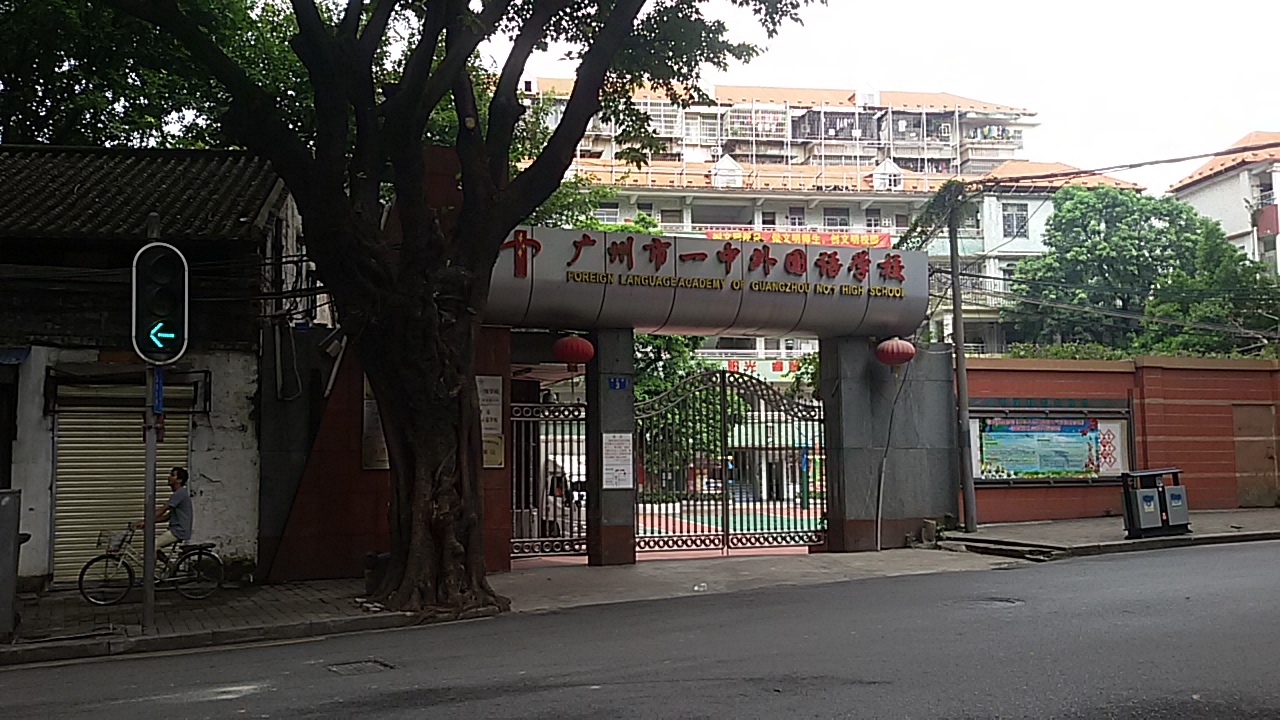 粵語: 廣州市一中實驗學校門口。舊時嘅50中響呢度。